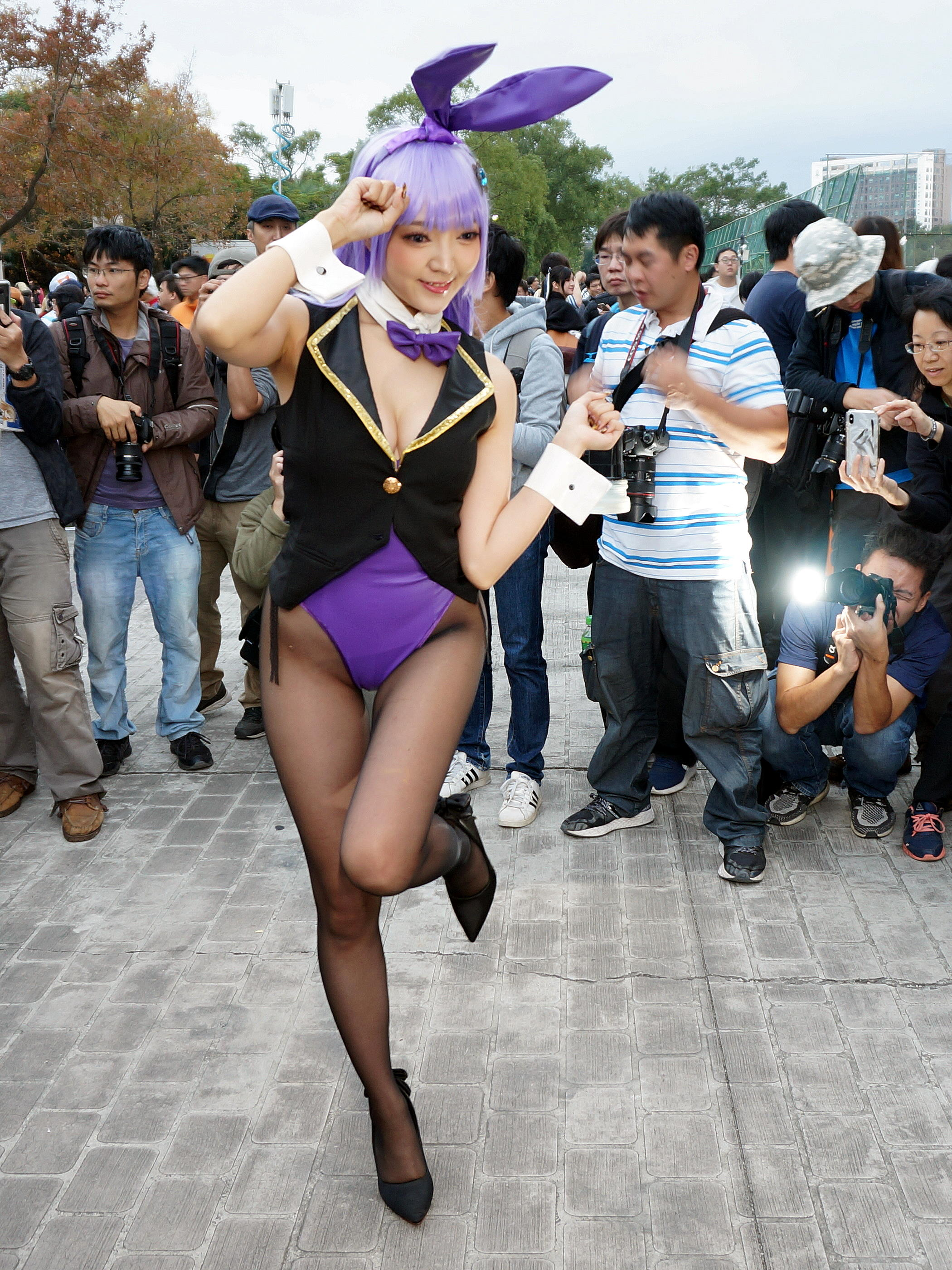 中文（台灣）: 第53屆台灣同人誌販售會，星野秀奈cosplay兔女郎裝《約會大作戰》誘宵美九。